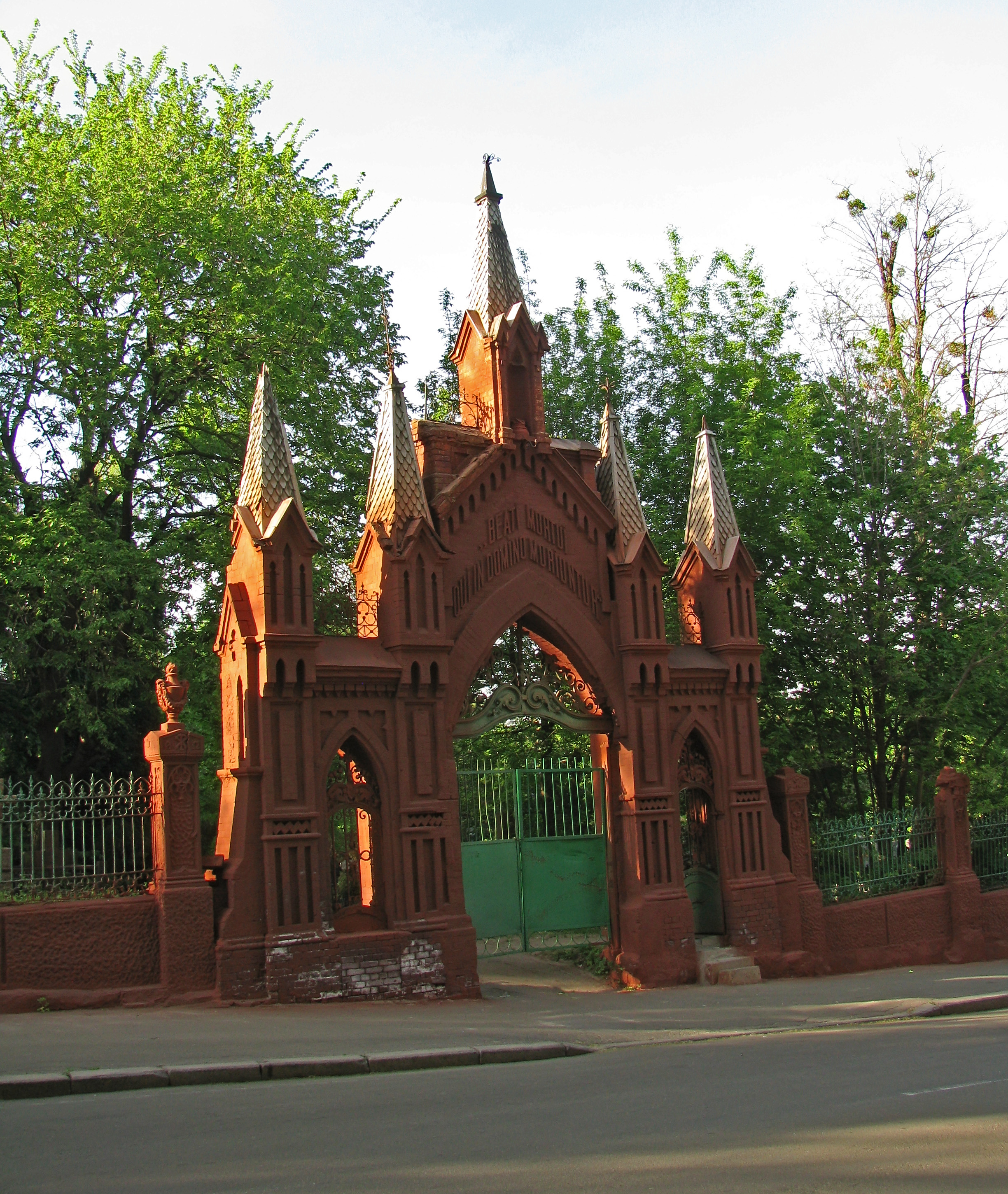 Огорожа католицької частини кладовища